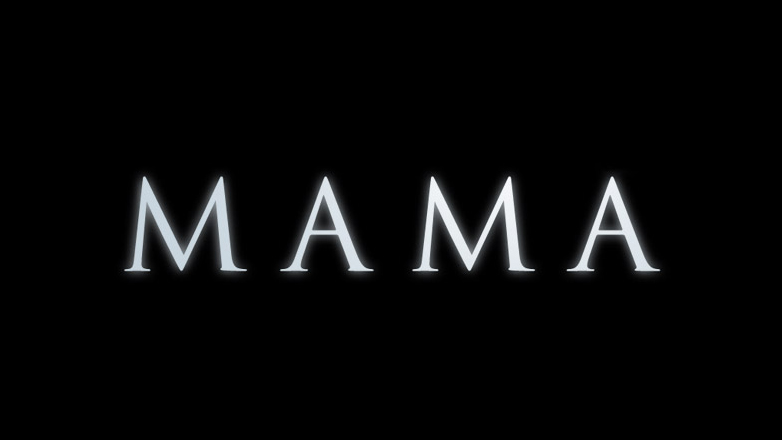 Logotipo de la película Mama, producida por Toma 78 y De Milo en 2013. Poster y logotipo diseñados por Cold Open.